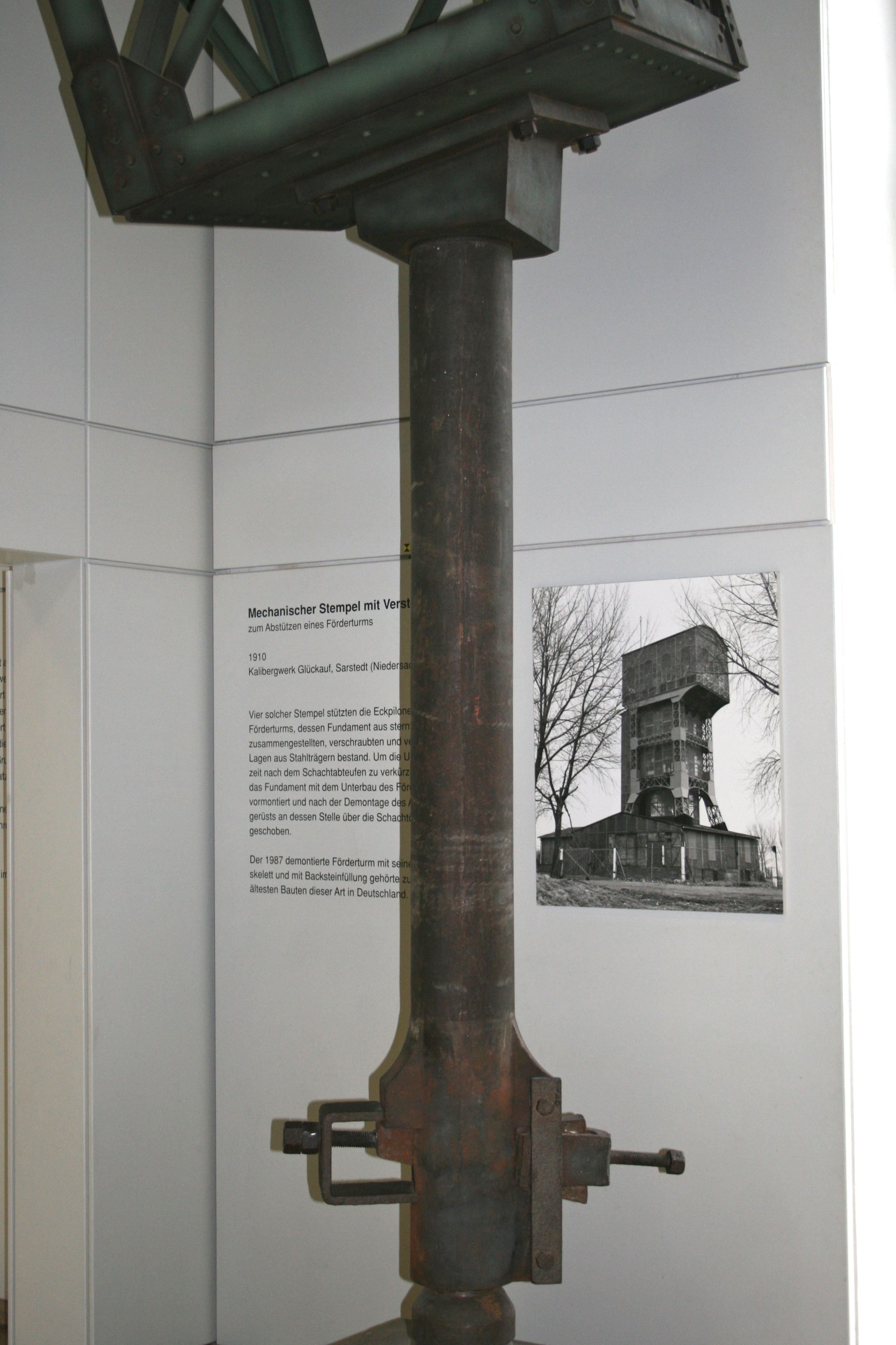 Hydraulikstütze des ehemaligen Förderturms Glückauf-Sarstedt im Deutschen Bergbaumuseum Bochum